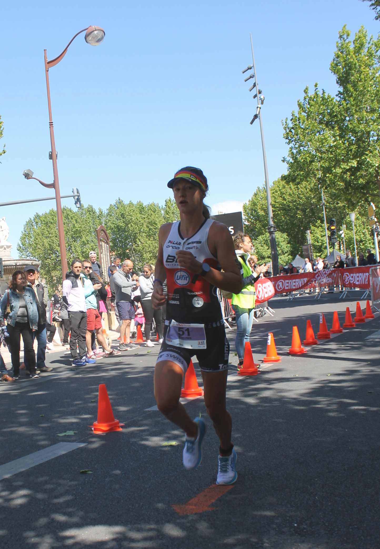 Emma Pallant IMPA 2019